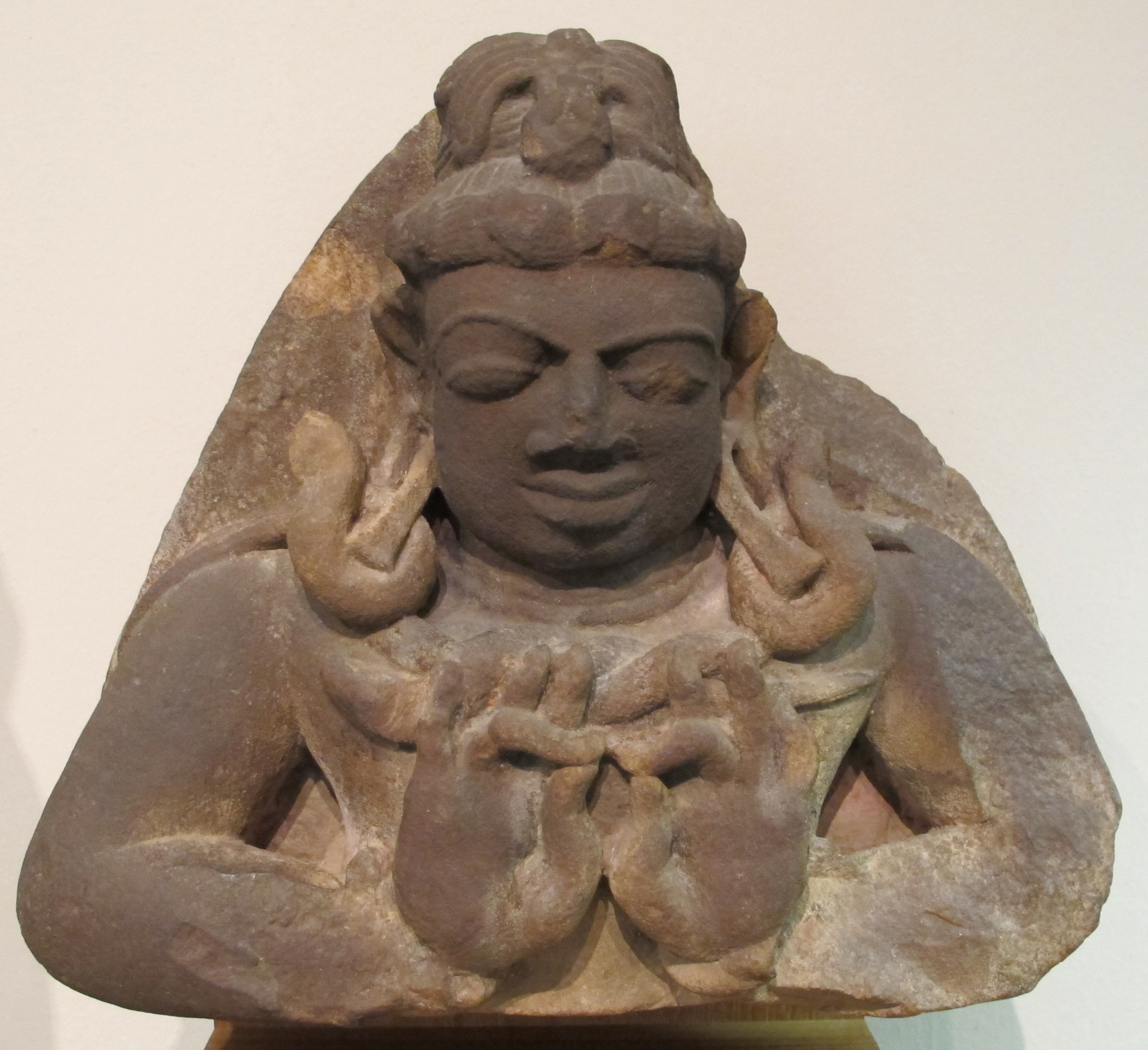 Lakulisa, maestro di shiva, forse deccan, VII-VIII sec